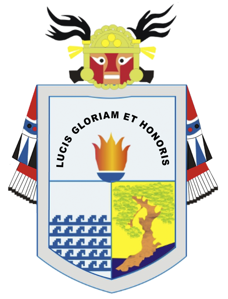 Escudo region Lambayeque